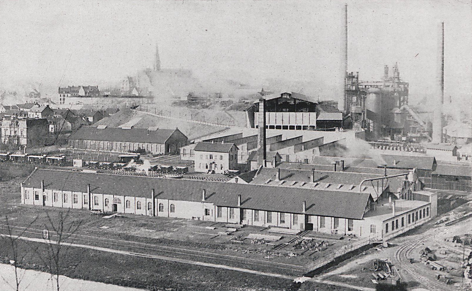 Ansicht der Waggonfabrik Gebr Lüttgens aus Hoff, Wilhelm (Hrsg.): Das Deutsche Eisenbahnwesen der Gegenwart; Teil: Bd. 2, Verlag R. Hobbing, S. 271 Quelle: Universitätsbibliothek Darmstadt (Digitale Sammlung)